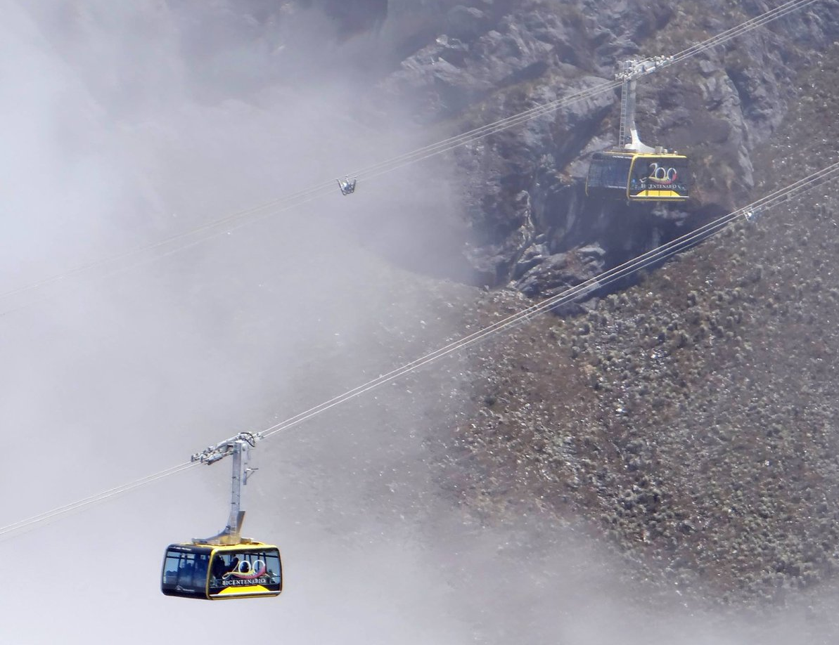 teleférico de Mérida (mukumbari), parque nacional sierra nevada, andes de Venezuela, en febrero de 2017 2